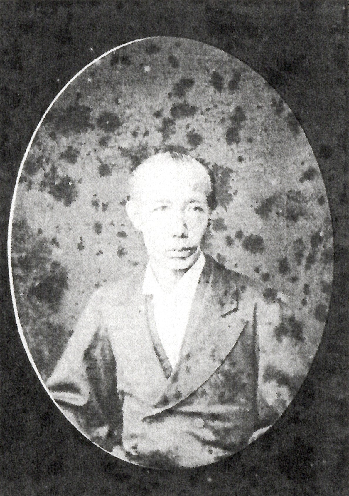 本堂親久の肖像写真。